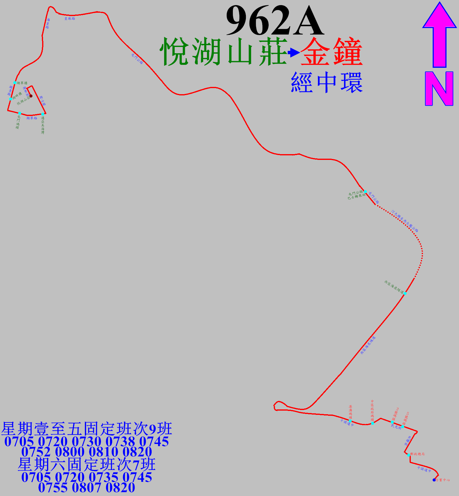 中文（香港）: 過海隧巴962A線的走線圖